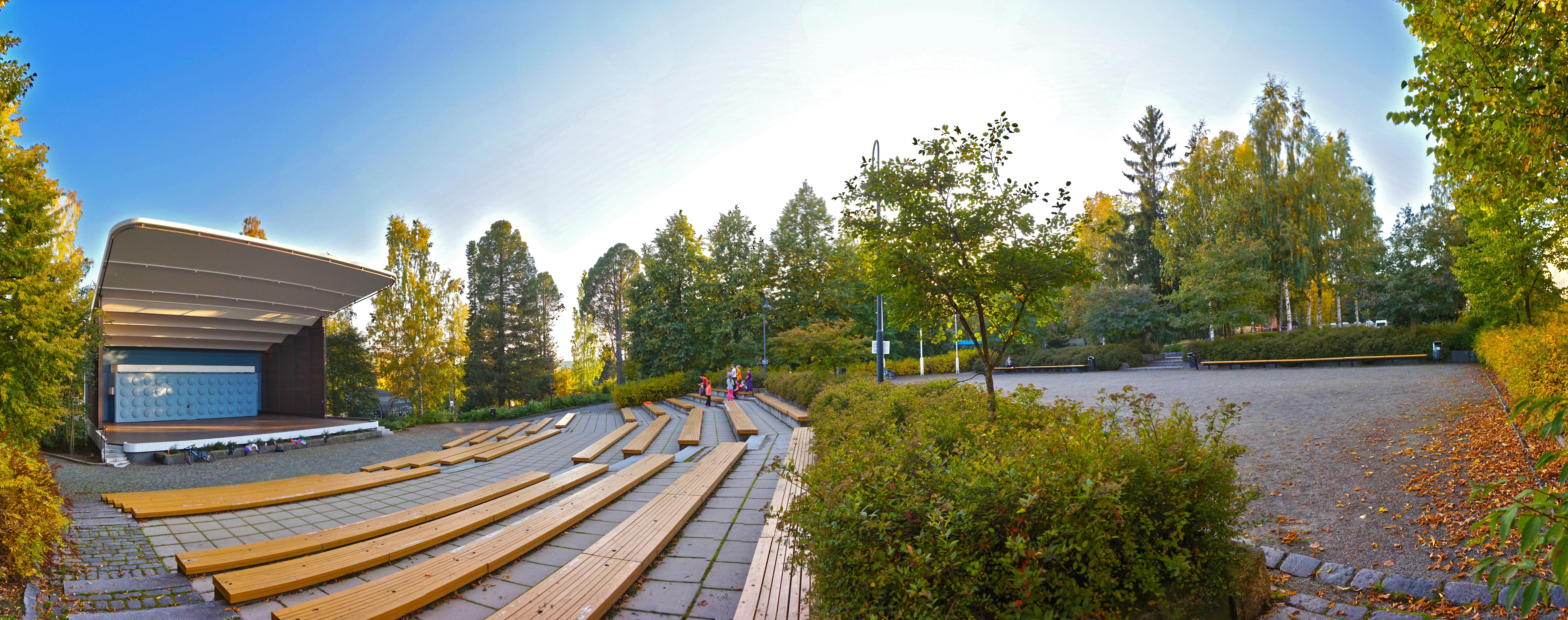 Lounaispuisto, Jyväskylä.